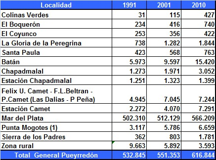 Cuadro con datos del censo